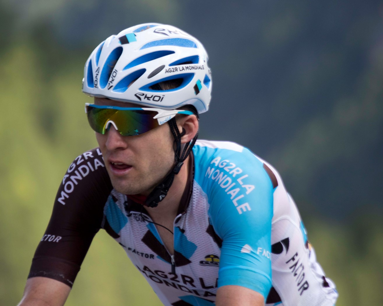 20-7_4 bakelants